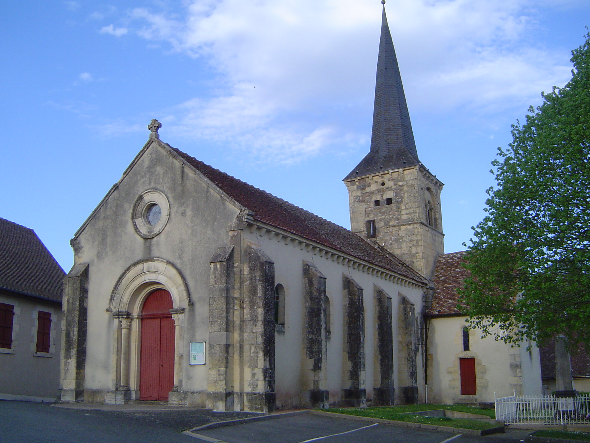 Fleury-sur-Loire (église 4)